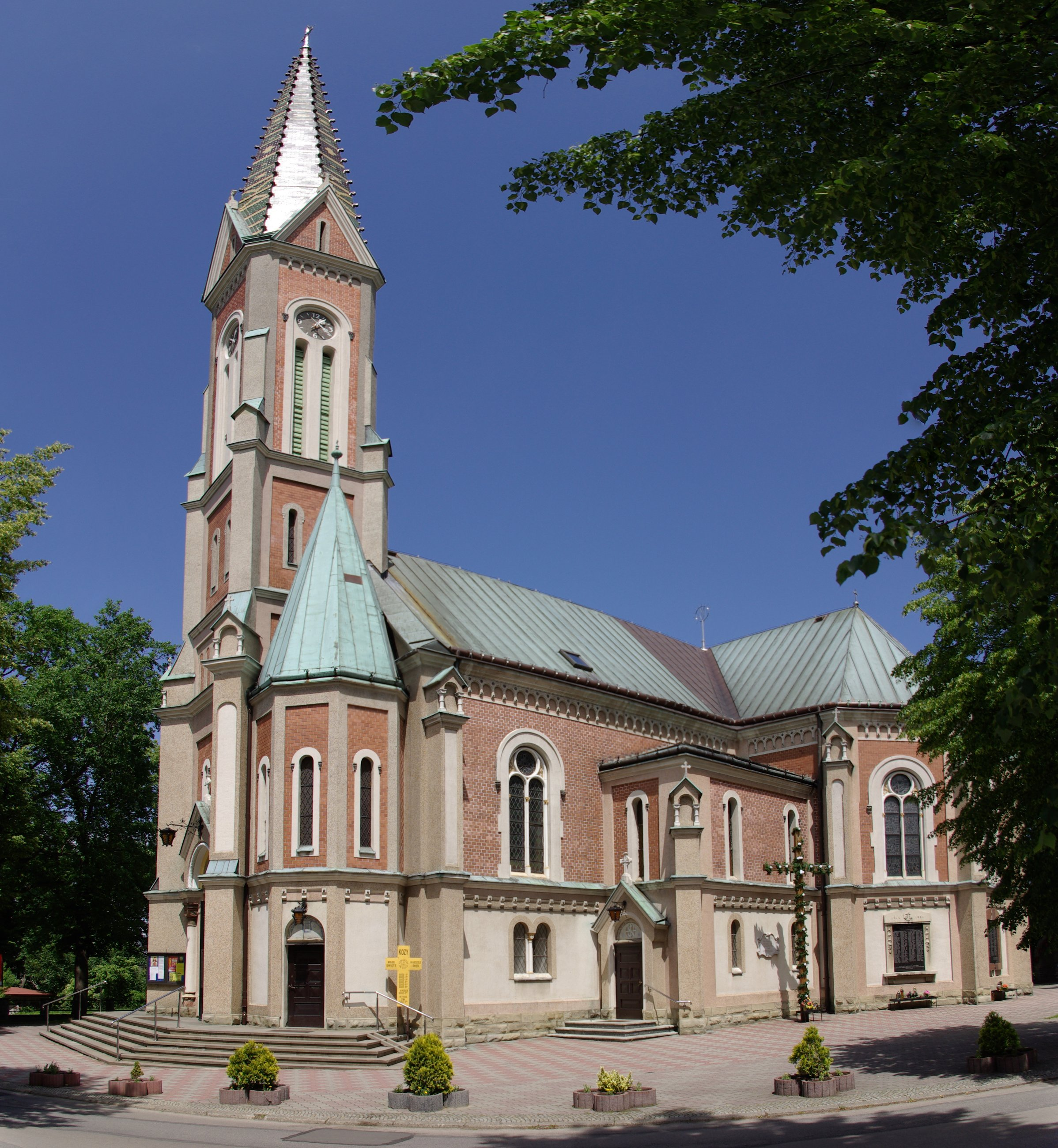 Kościół parafialny pw. Świętych Apostołów Szymona i Judy Tadeusza w Kozach, powiecie bielskim